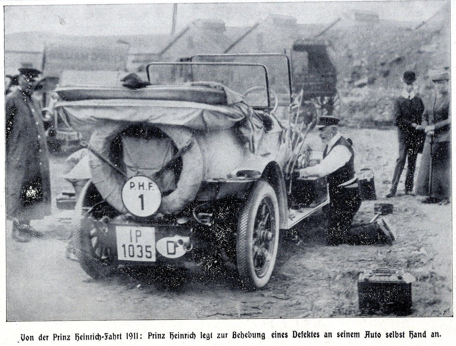 Prinz Heinrich-Fahrt 1911 - Prinz Heinrich repariert sein Auto selbst.